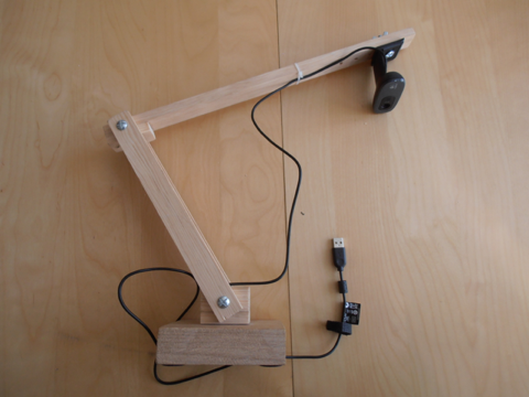 Ce visualiseur FLTM (fais le toi même) est réalisé pour la classe avec 3 euros de bois et de vis et une caméra HD autofocus à 30 euros. La procédure de fabrication est détaillée sur